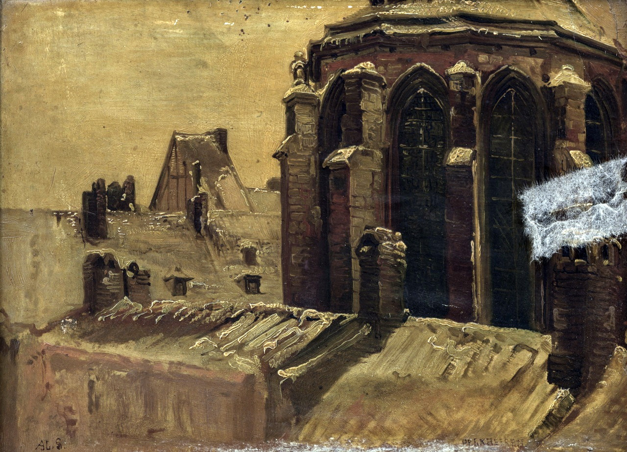 Olieverfschilderij door Alexander Schaepkens van de apsis van de Dominicanenkerk in Maastricht. Formaat: 24,1 x 32,6 cm (excl. lijst); 36 x 44 cm (incl. lijst). Collectie Bonnefantenmuseum Maastricht, objectnummer 1000940 (bruikleen 1951).